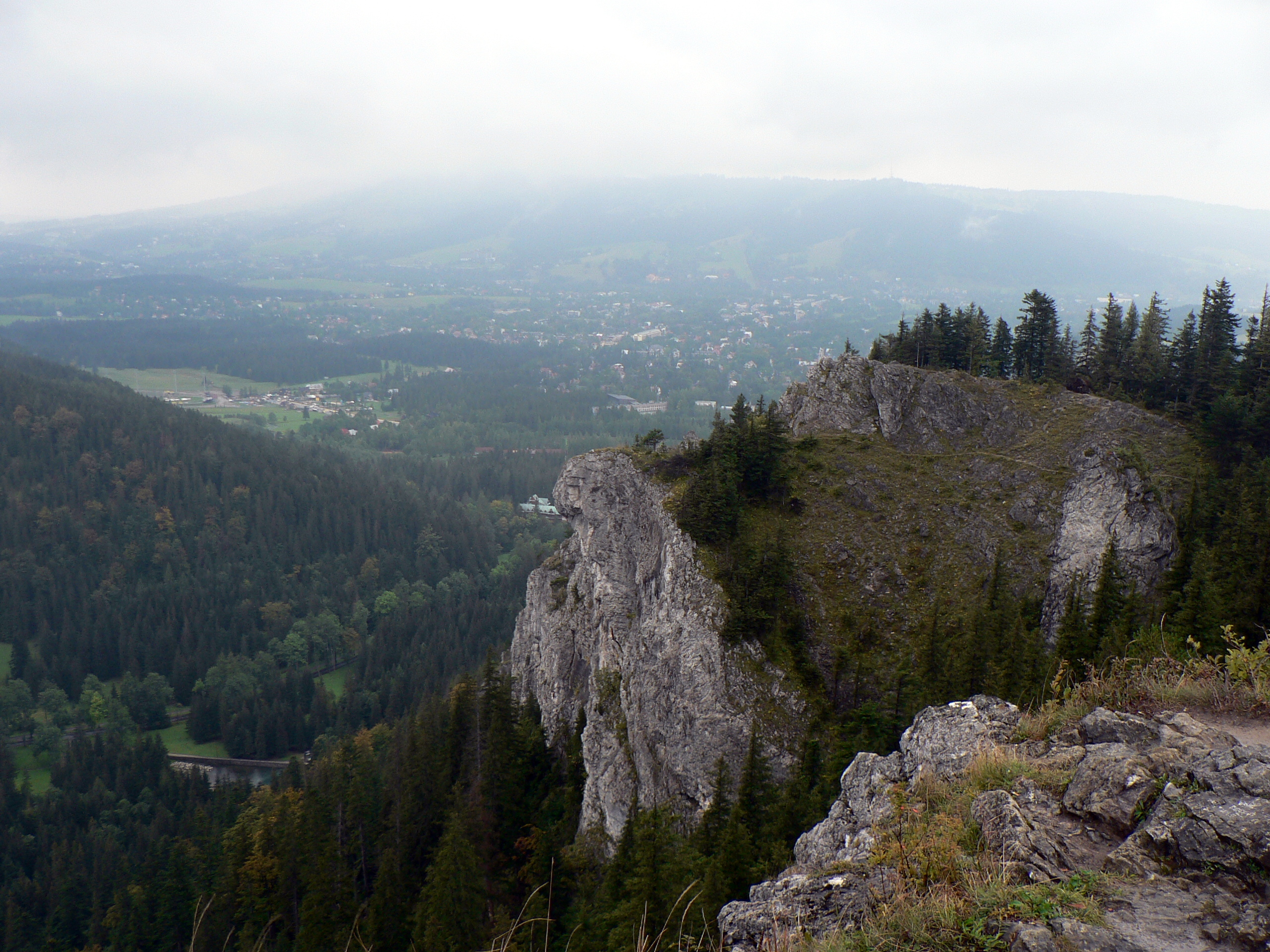 Widok na Zakopane ze szczytu Nosala